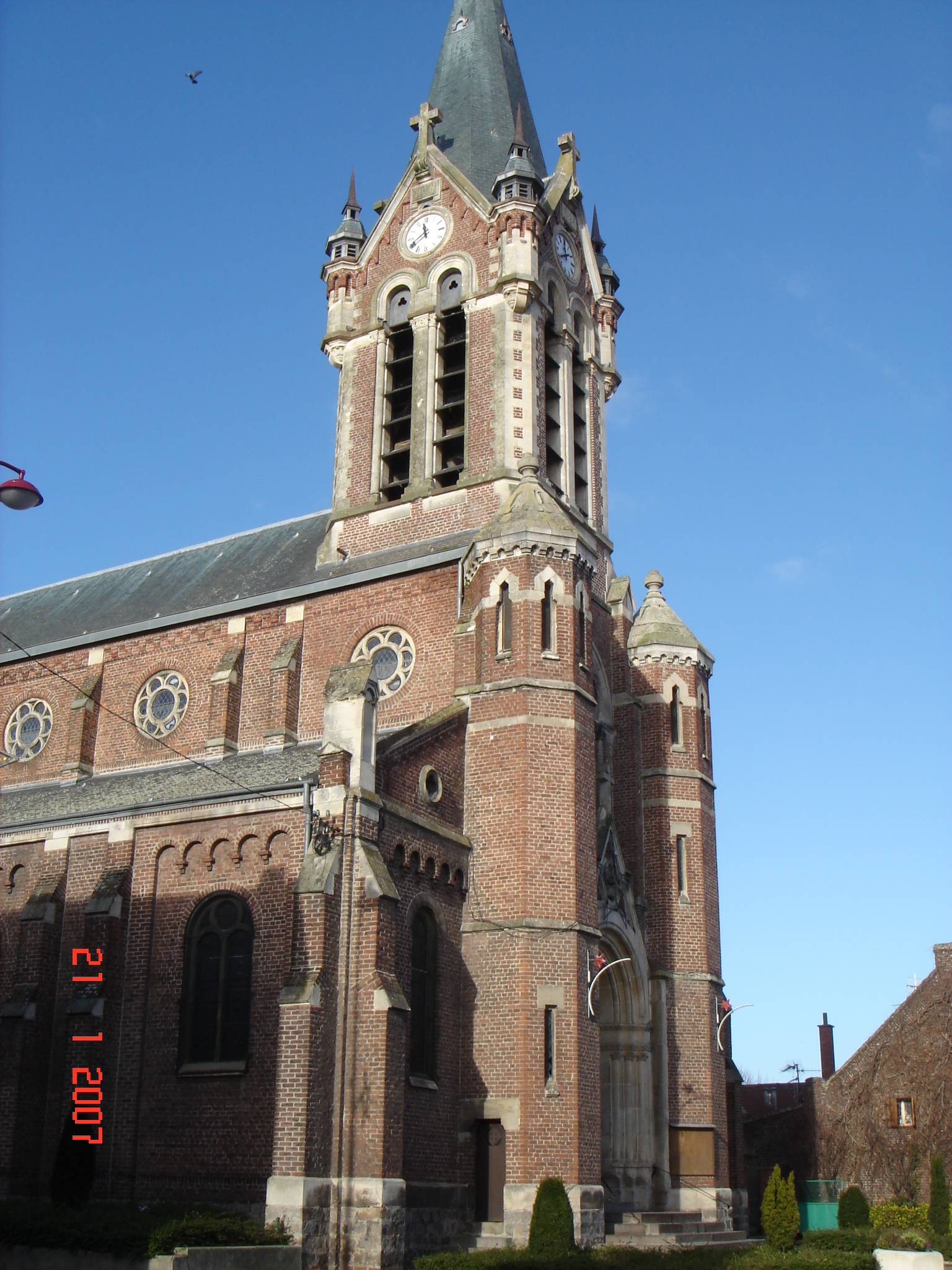 Auberchicourt. L'église